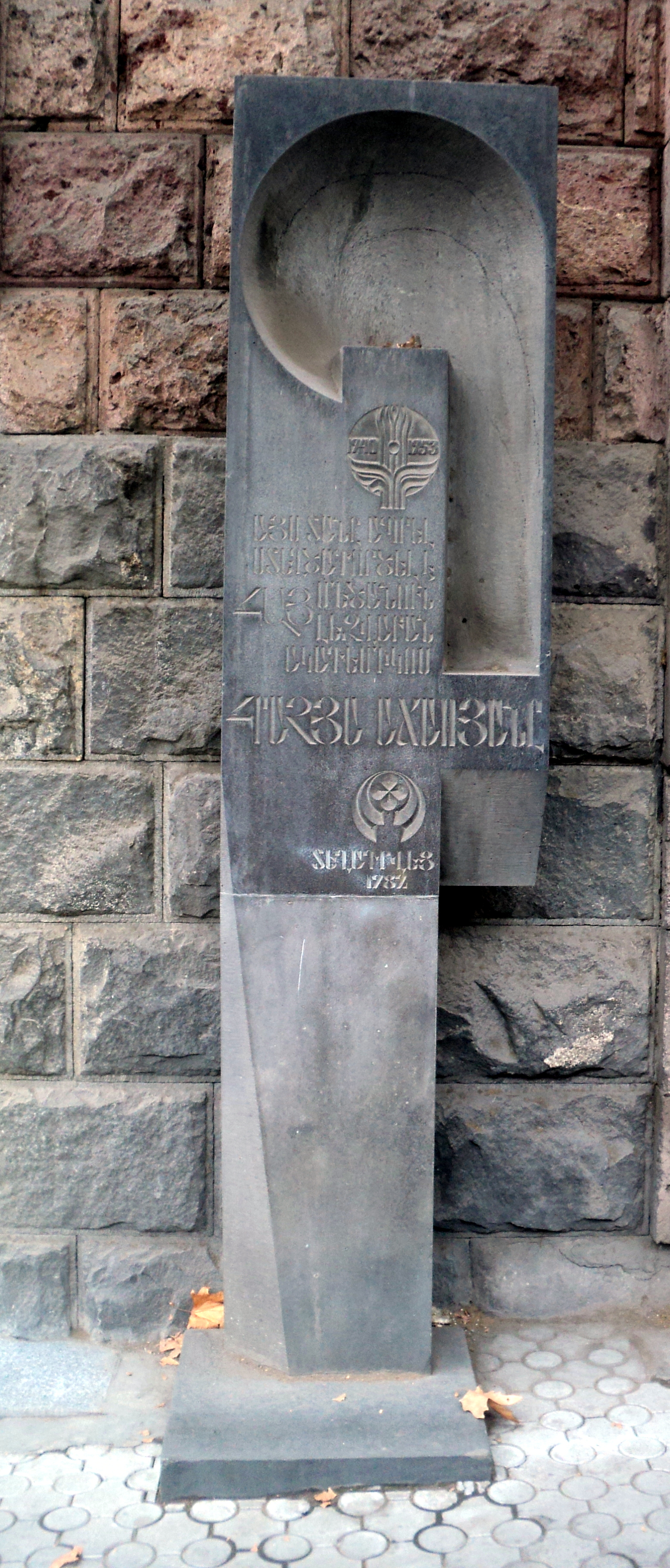 Հուշակոթող` Հրաչյա Աճառյանի 6/104